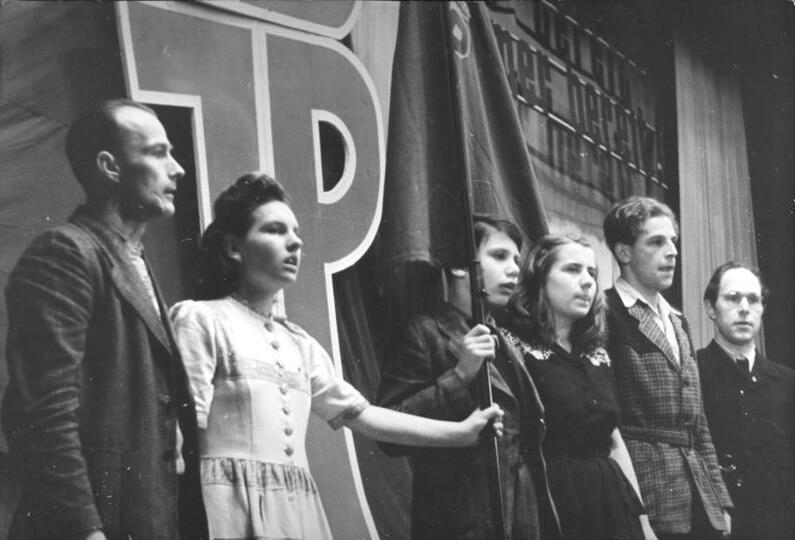 Zentralbild 20.3.1949 Am 20.3.1949, fand im Berliner-Friedrichstadtpalast die Gründungsfeier des Verbandes der "Jungen Pioniere" statt. U.B.z: Die Übergabe der Freundschaftsfahne der FDJ an die "Jungen Pioniere" Links Karl Hasforst, Vorsitzender der Berliner Jungen Pioniere, Zweiter von rechts: Peter Frey, Vorsitzender der Berliner FDJ. 2958 49